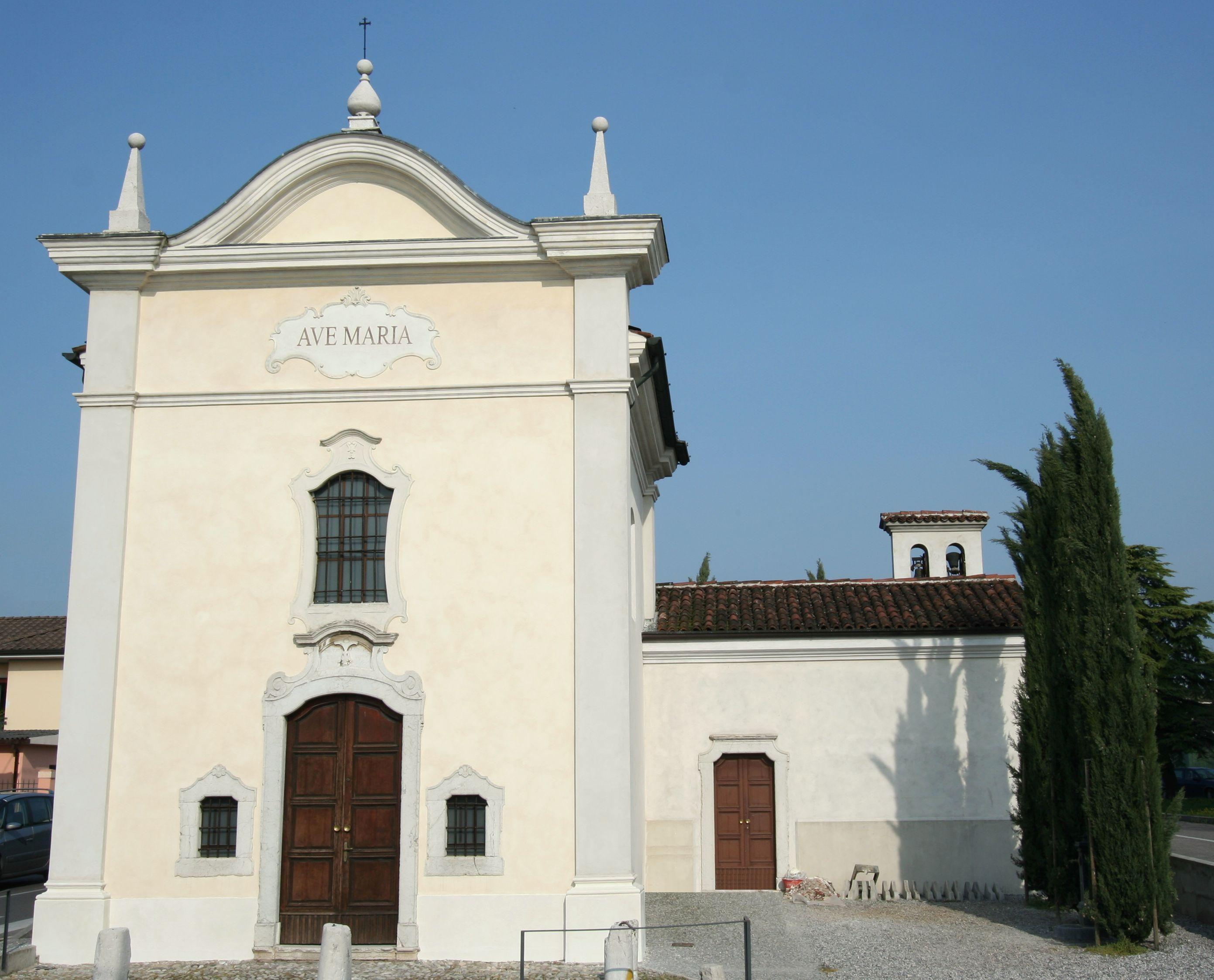 Ghedi-Chiesetta Beata Vergine di Caravaggio